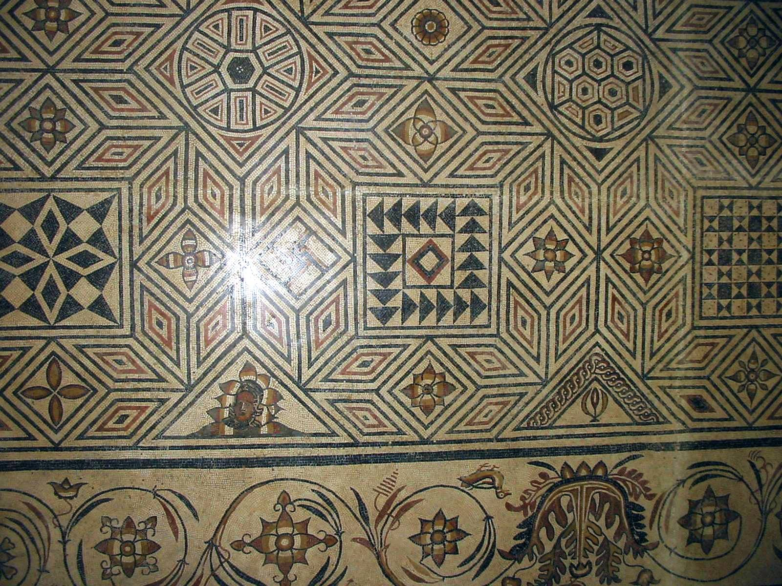 Mosaïque gallo-romaine, musée archéologique de Vésone, Périgueux, France